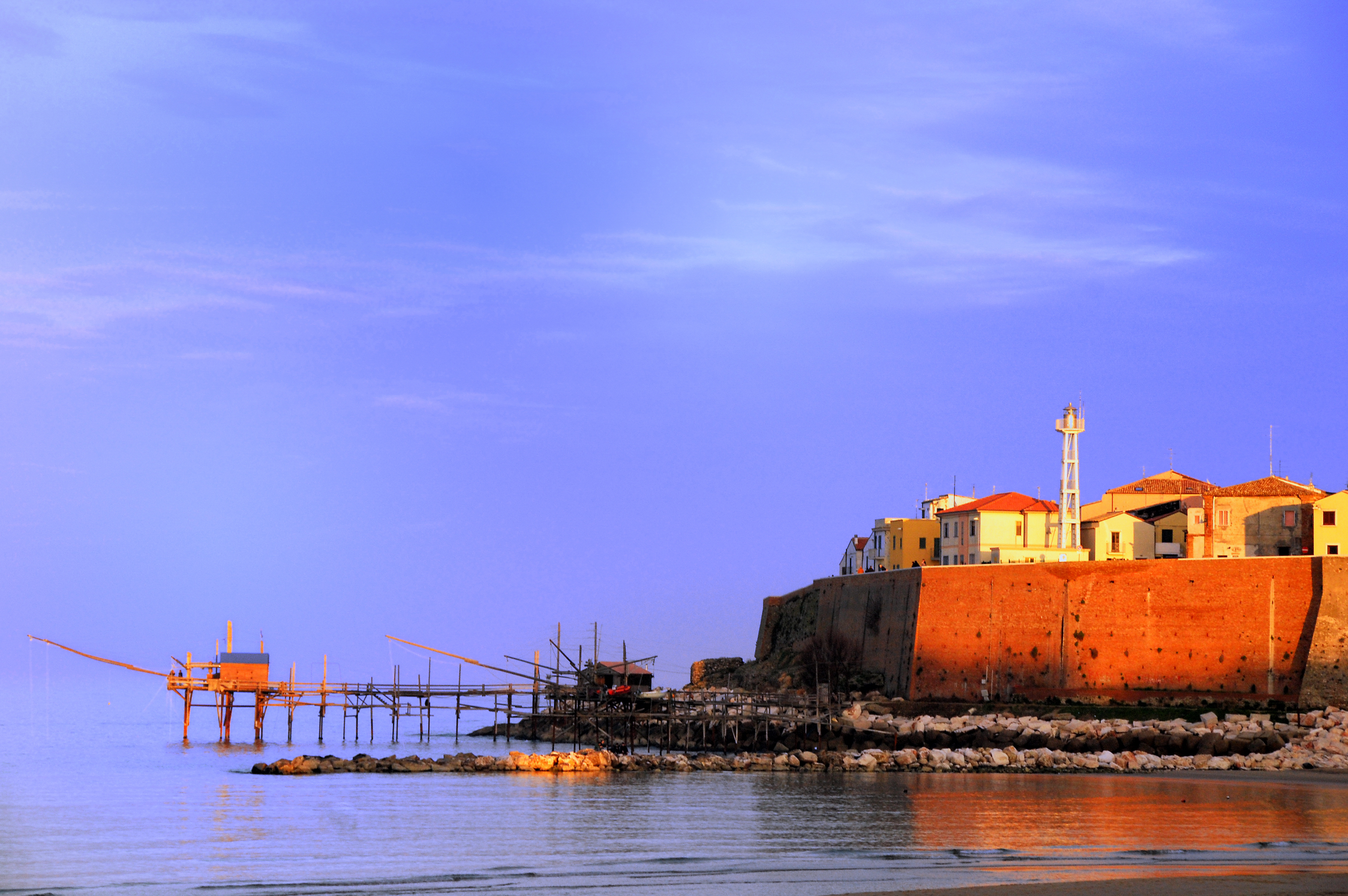 Termoli il borgo antico con trabucco